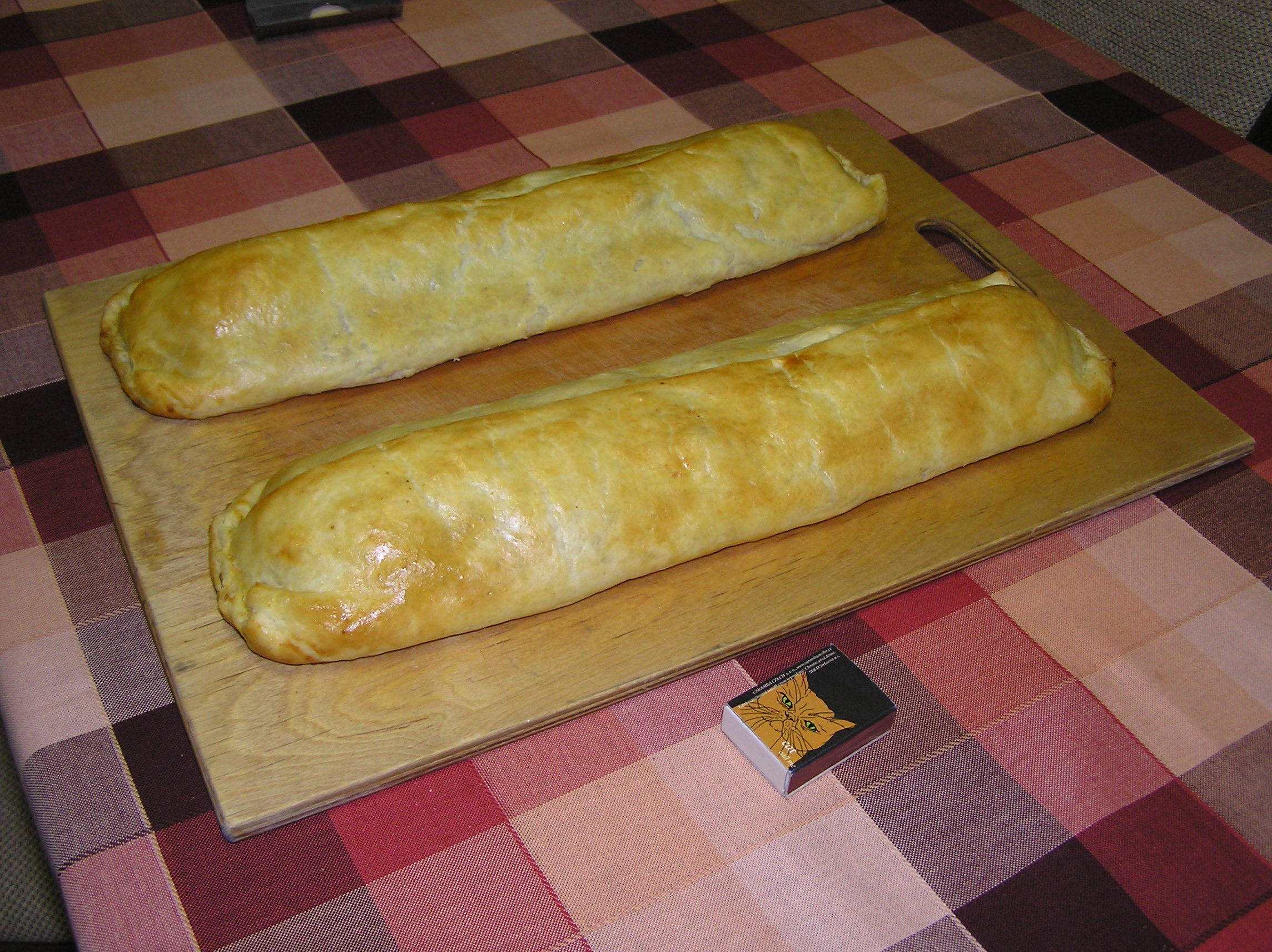 Strudel.